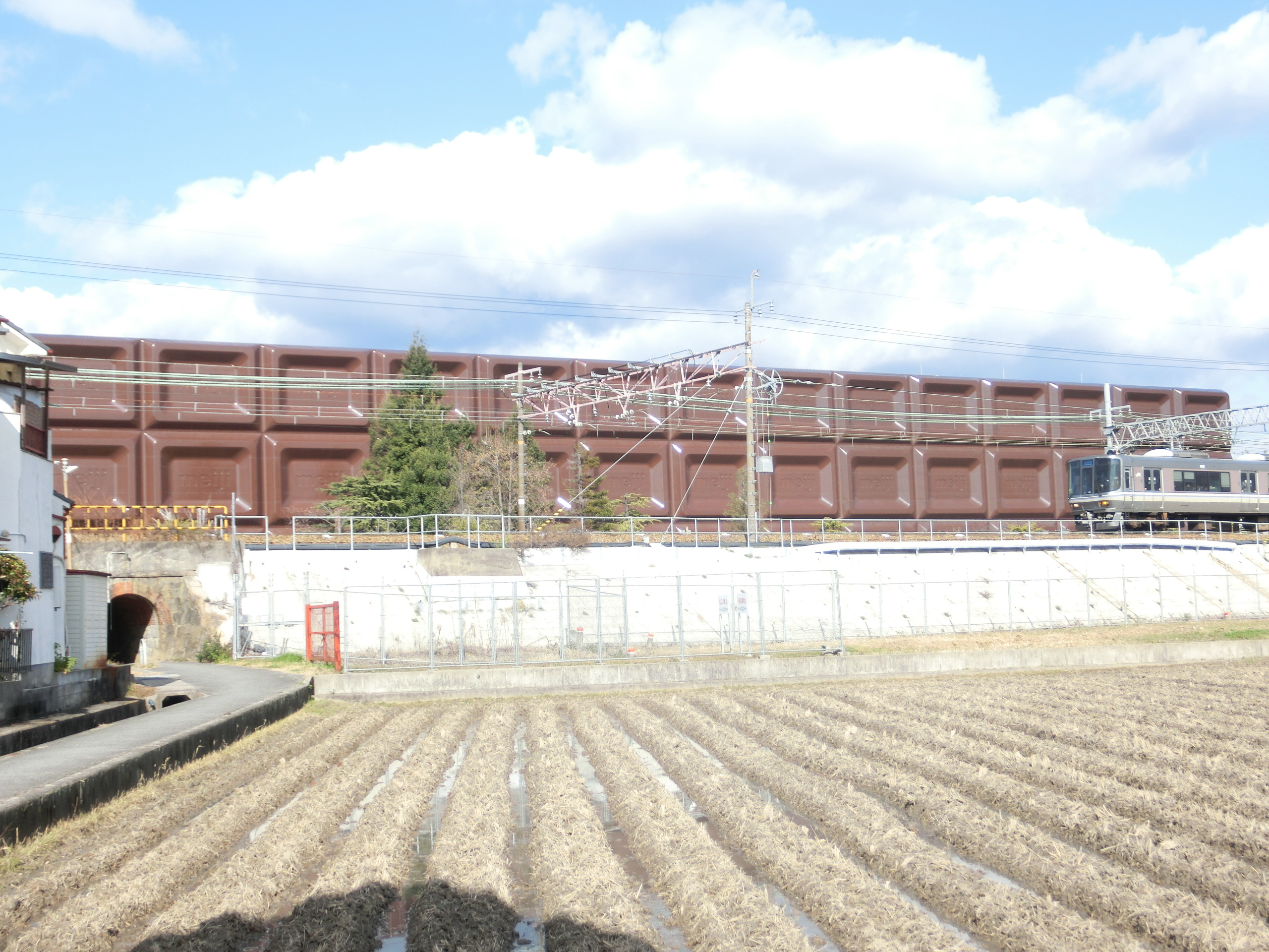 明治大阪工場のビッグミルチ。手前はJR京都線。